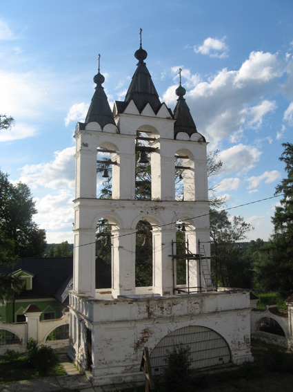 Звонница в Больших Вязёмах